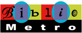 logo-oficial